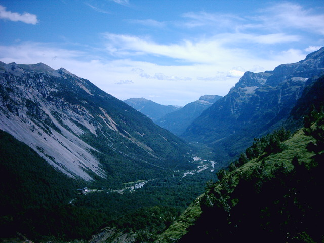 Valle de Ordesa, pirineo aragonés, cerca de la frontera franco-española